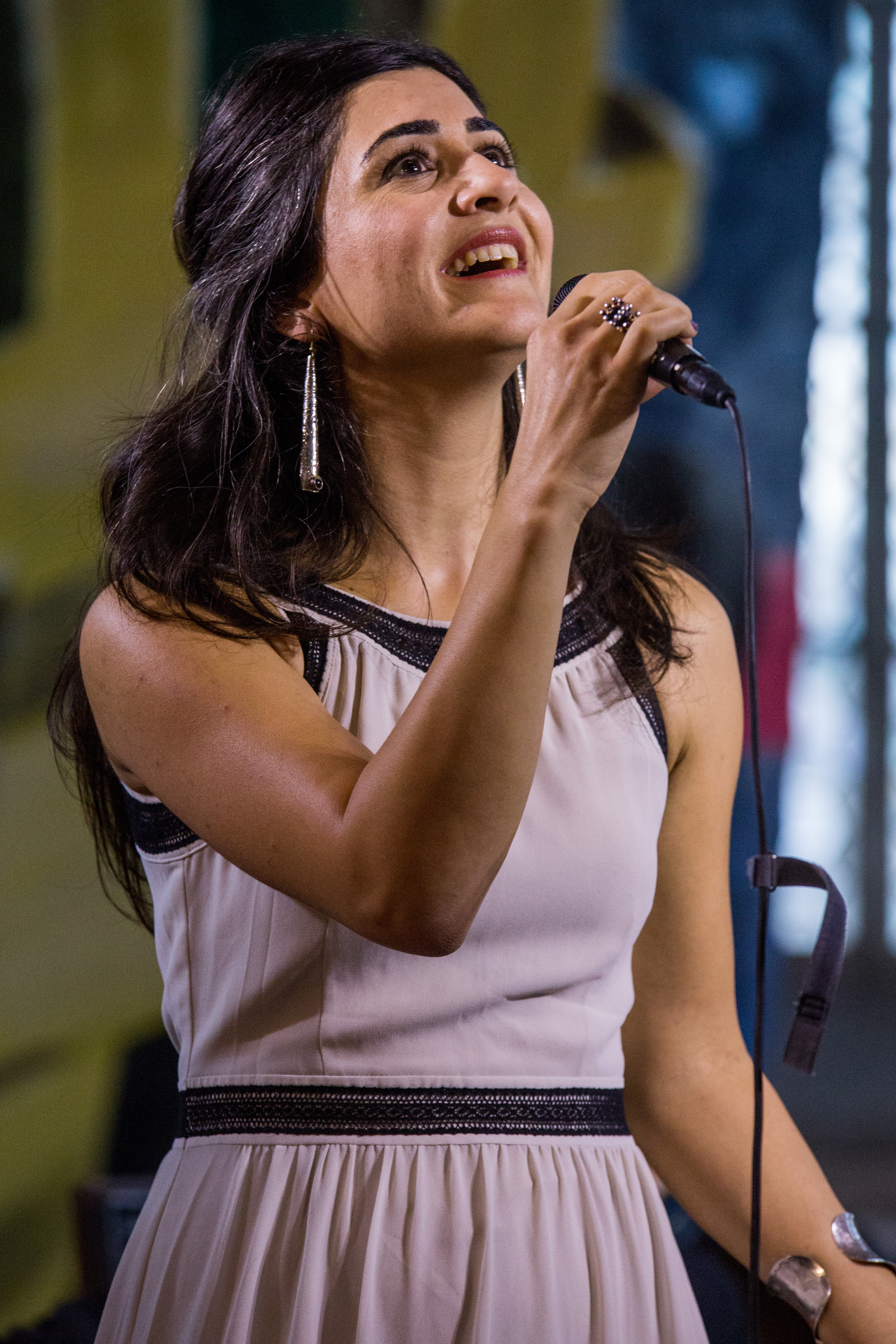 Çiğdem Aslan in der Stadtkirche Rudolstadt